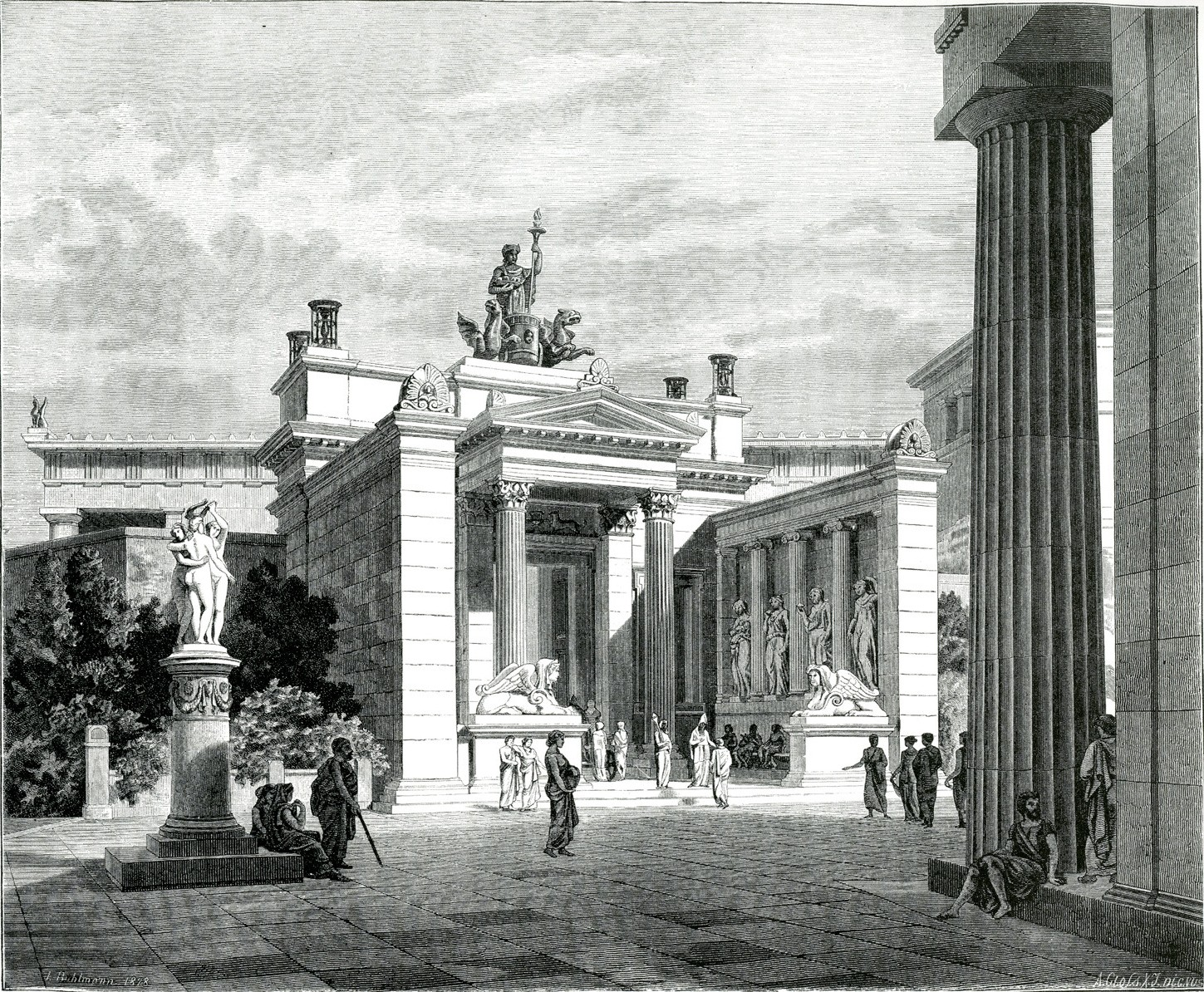 Ιάκωβος Φάλκε. Ελλάς, ο Βίος των Αρχαίων Ελλήνων. Κατά το γερμανικό του Ιακώβου Φάλκε, Ν. Γ. Πολίτης (μετ.), Αθήνα, Κάρολος Βίλμπεργκ, 1887